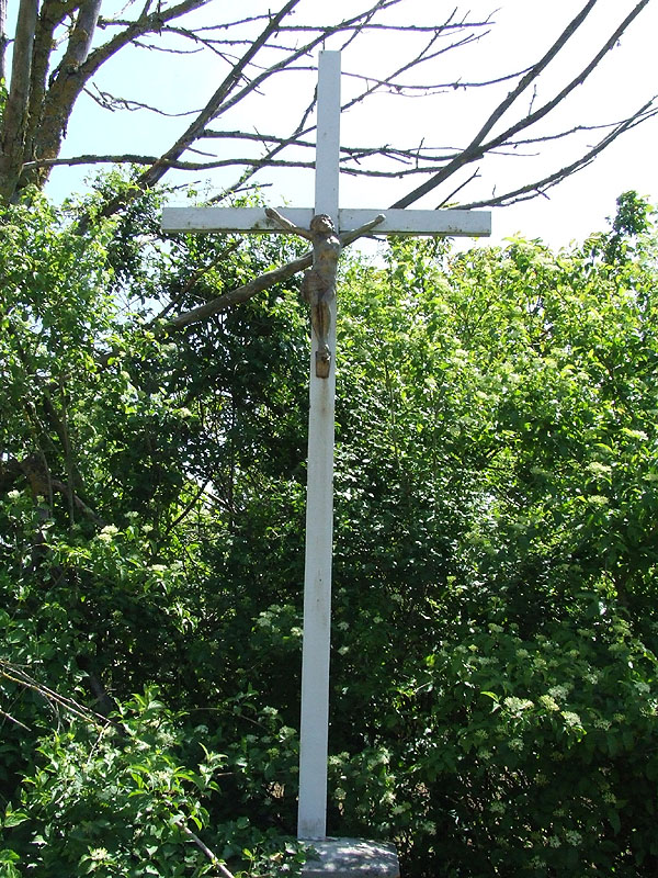 Calvaire de l'ancien presbytère d'Étais-la-Sauvin